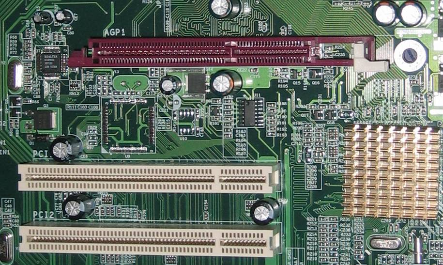 AGP slot (top).